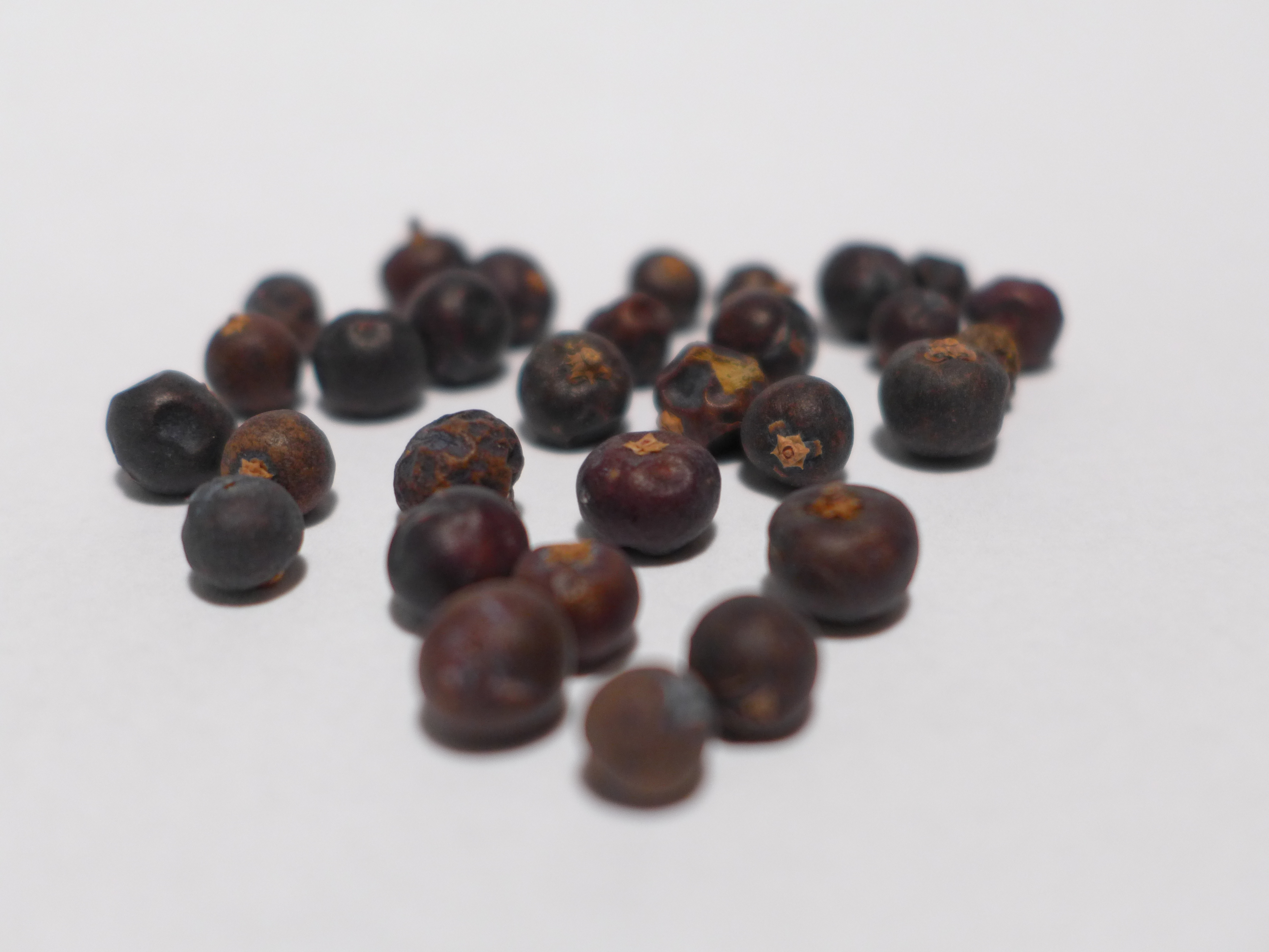 juniper berries / Wacholderbeeren getrocknet